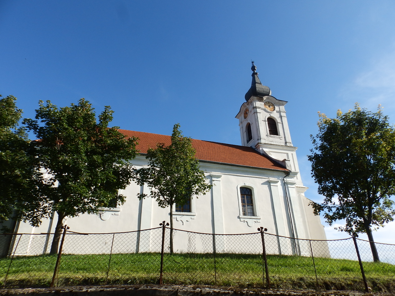 Református templom, Balatonfőkajár